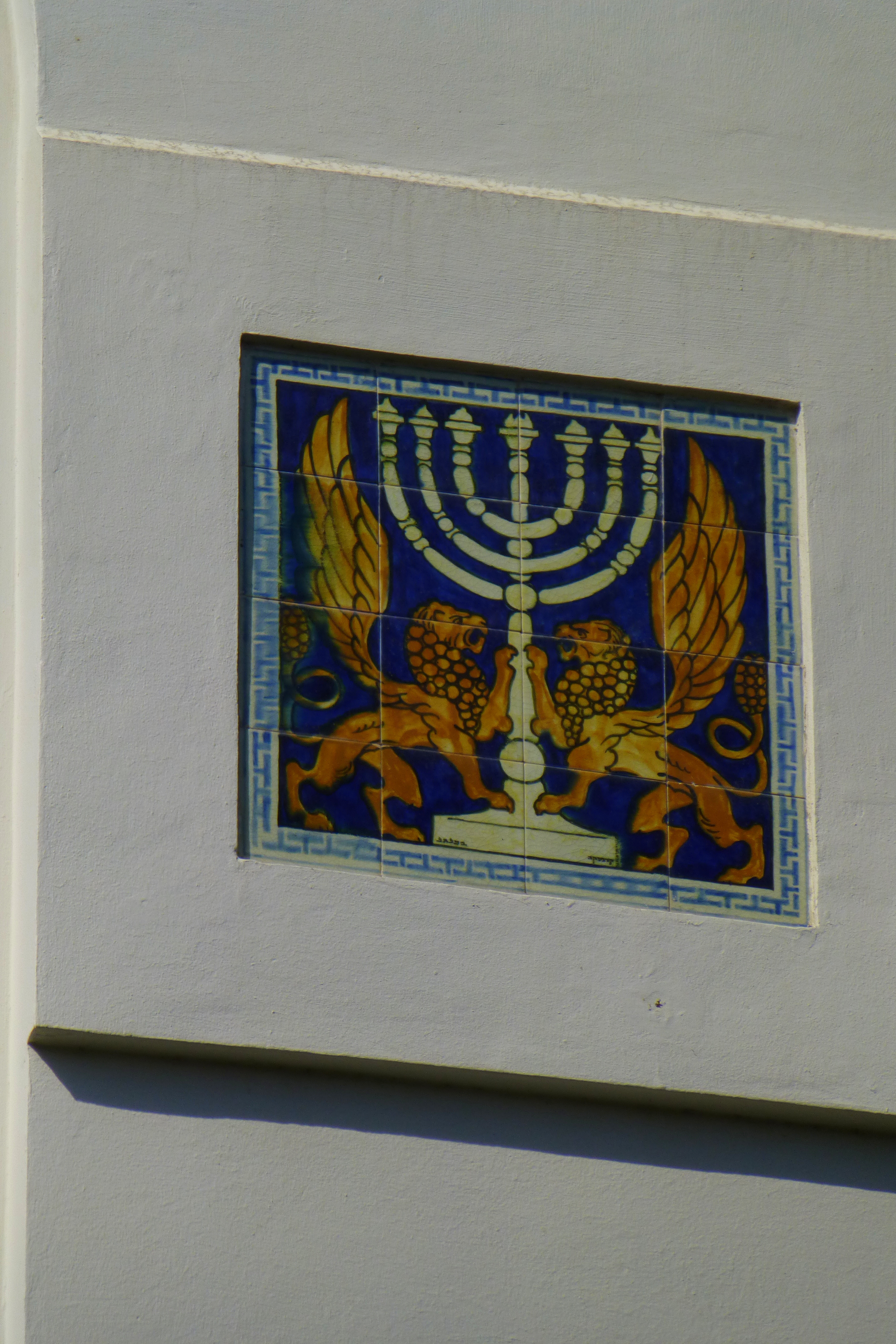 "בית הספר אחד העם" הוא מבנה בית ספר השוכן ברחוב אחד העם בתל אביב. בית הספר נבנה בשנת 1924 בתכנונו של האדריכל ד. הרשקוביץ כ"בית הספר העירוני", אולם לאחר שהוענק לאחד העם תואר אזרח כבוד של העיר, בשנת 1924, הוסב שמו של המבנה ל"בית הספר אחד העם".